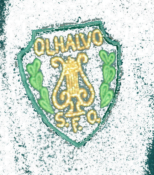 Simbolo da Sociedade Filarmónica Olhalvense